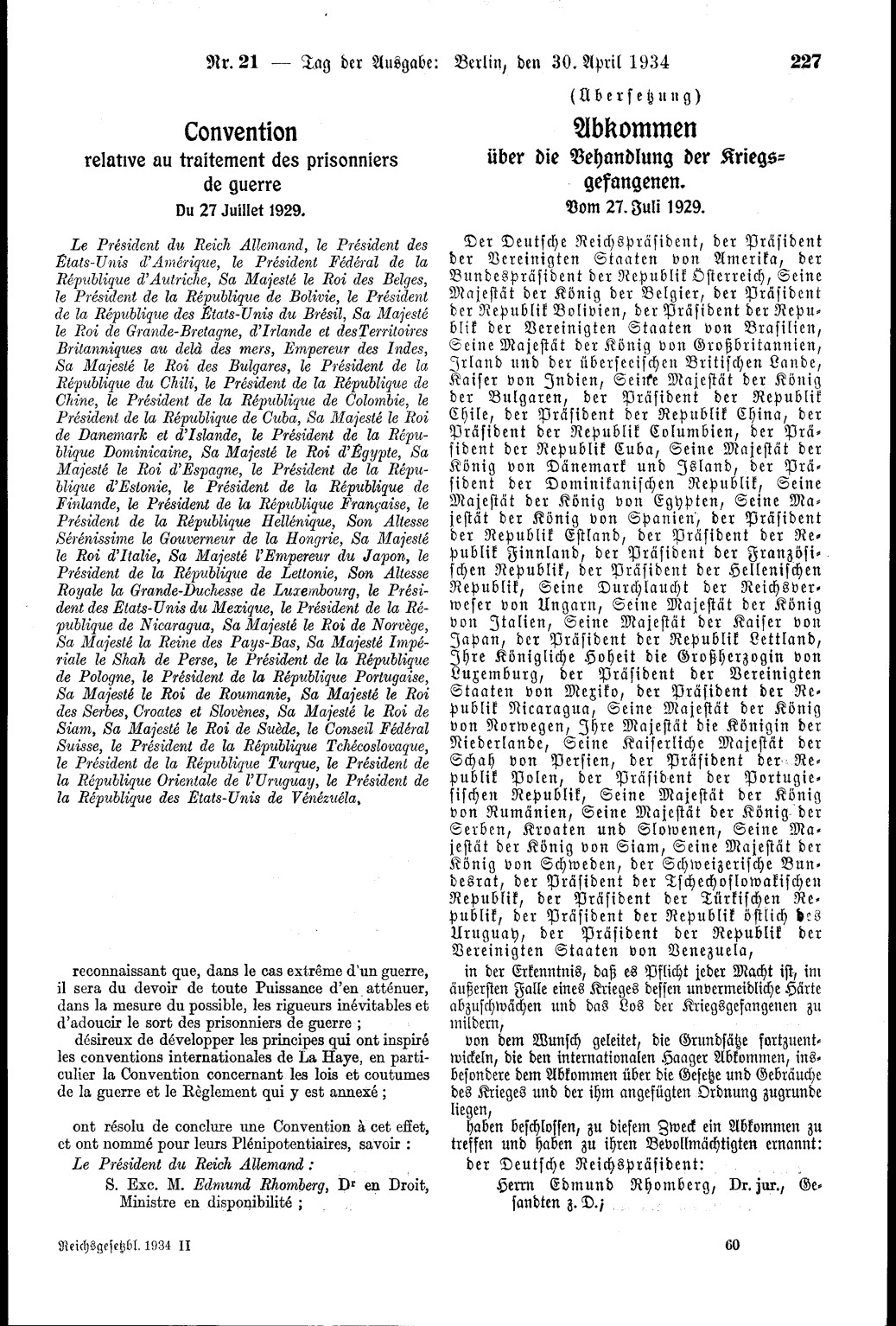 RGBl. 134 II, p. 227